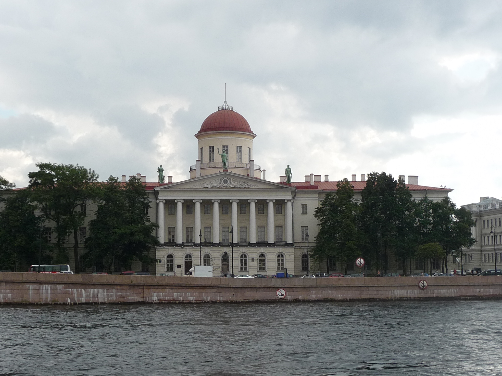 Palace-p1030955.jpg